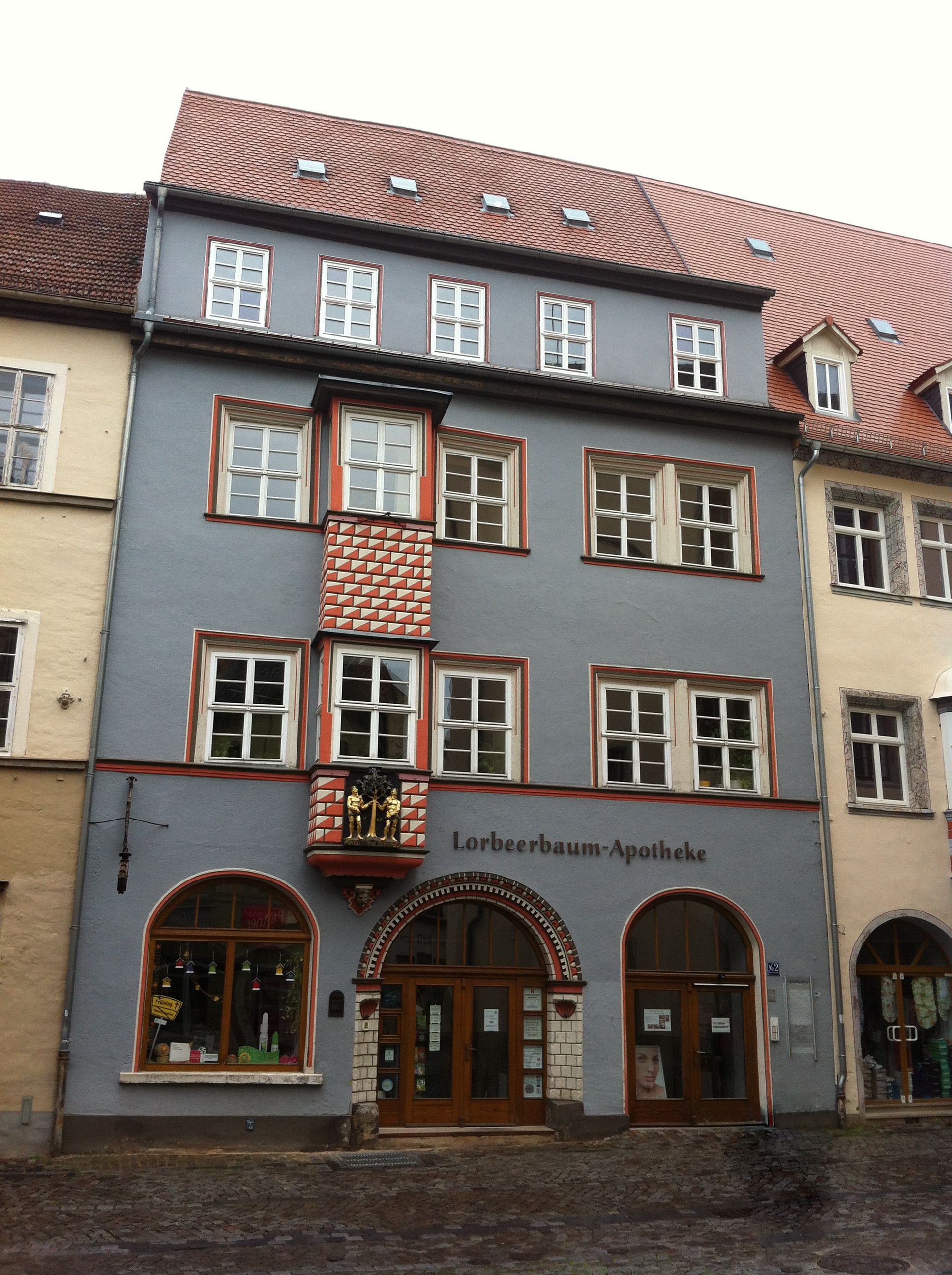 Region: Saale-Unstrut-Triasland; Lorbeerbaumapotheke in Naumburg (Saale)